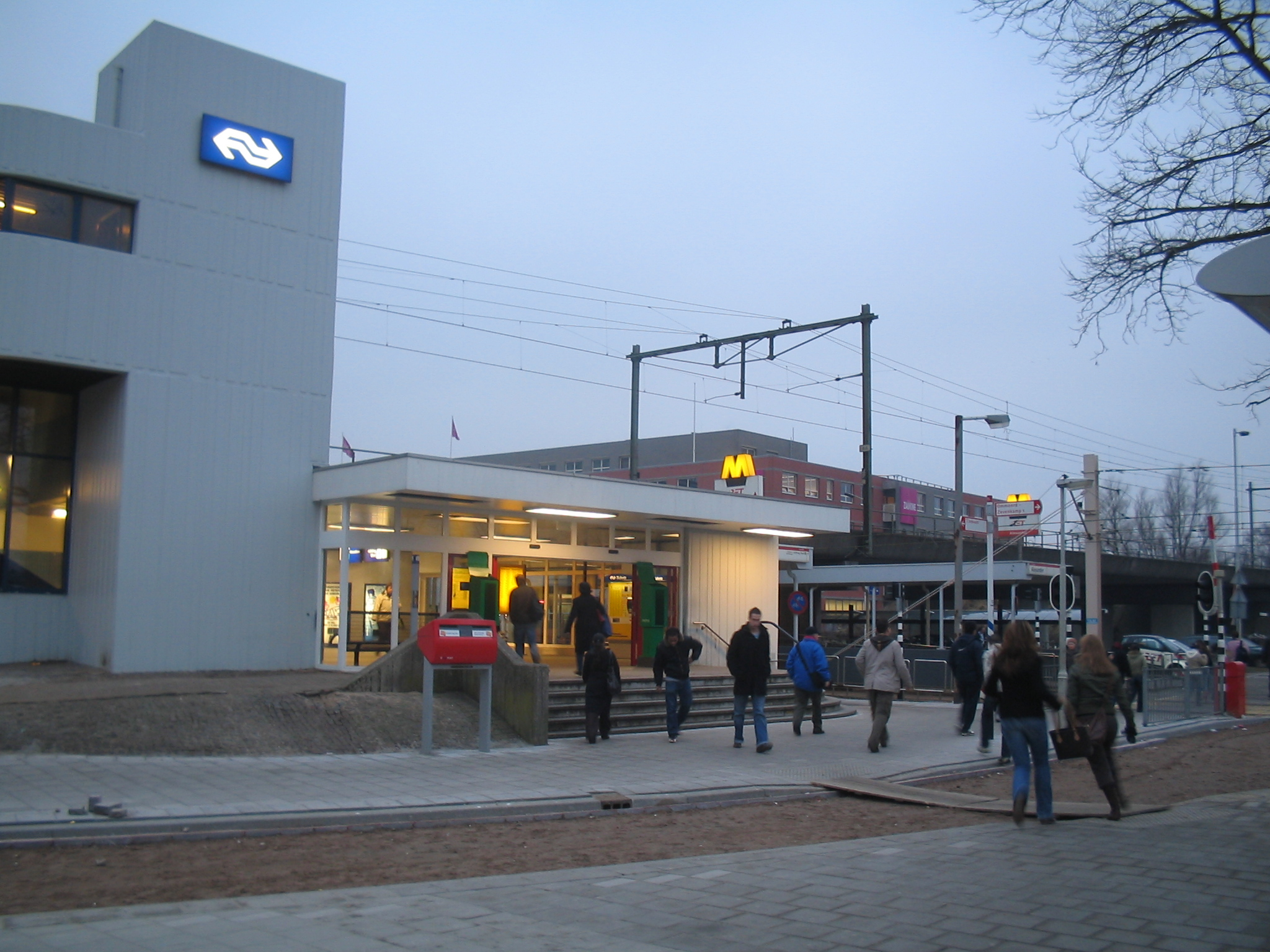 Station Rotterdam Alexander, ingang Metro- en NS-station.